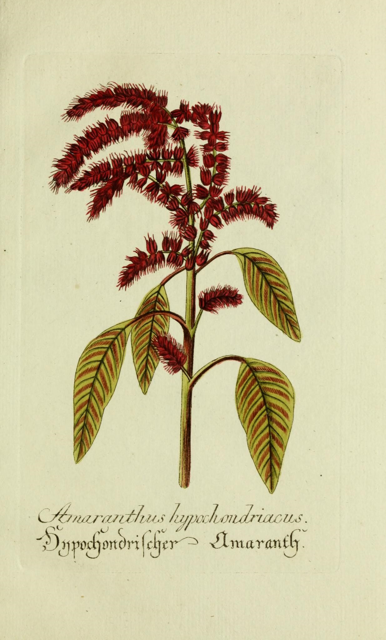 Plantarum indigenarum et exoticarum icones ad vivum coloratae, oder, Sammlung nach der Natur gemalter Abbildungen inn- und ausländlischer Pflanzen, für Liebhaber und Beflissene der Botanik /